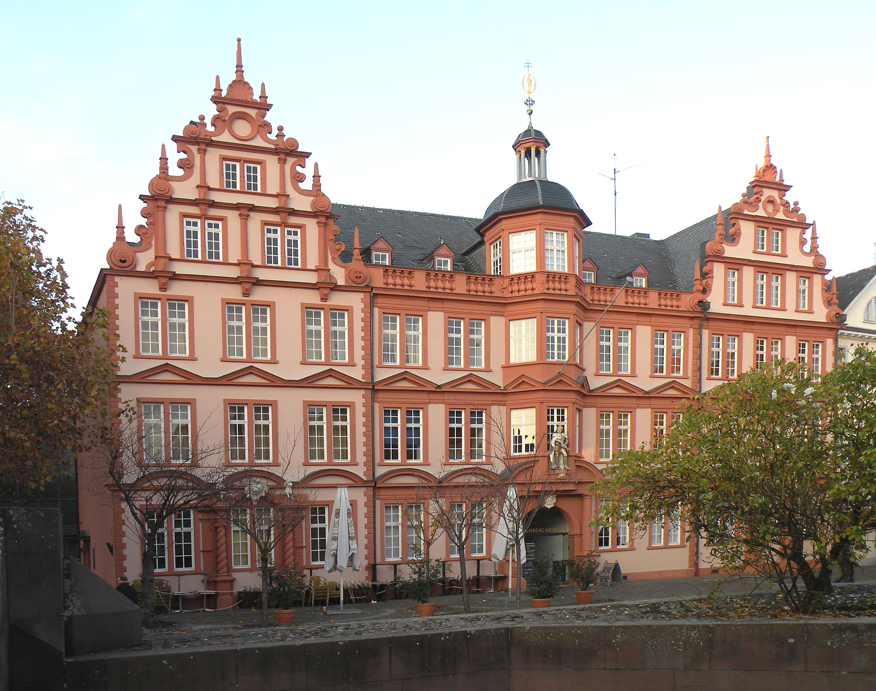 Mainz, Gutenbergmuseum